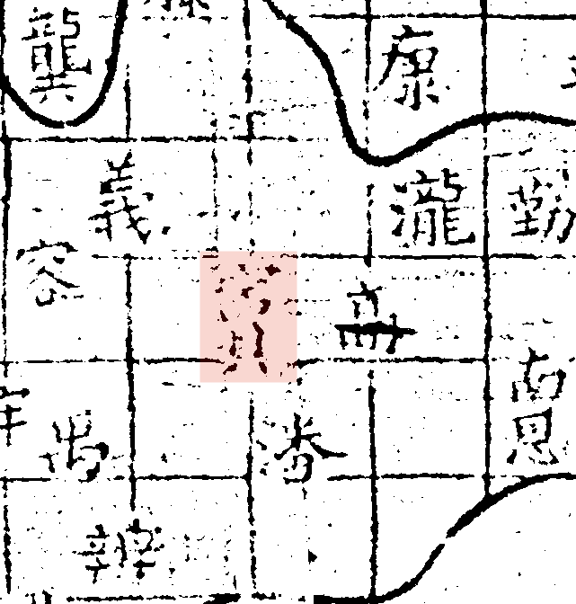 粵語: 禹跡圖中嘅竇州